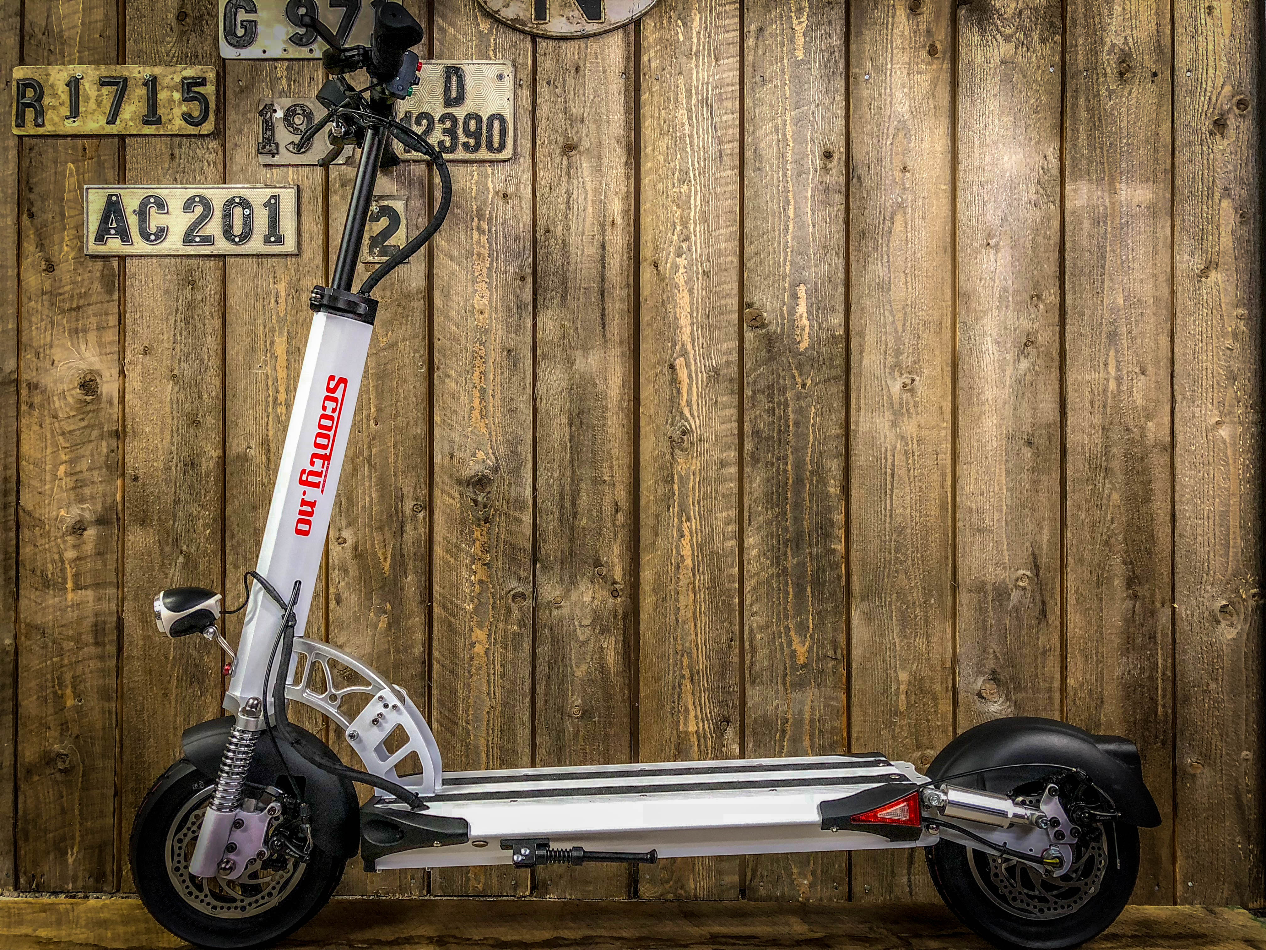 Kraftig El-sparkesykkel beregnet på voksene